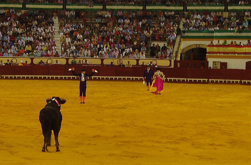 Novillada nocturna en El Puerto de Santa María.